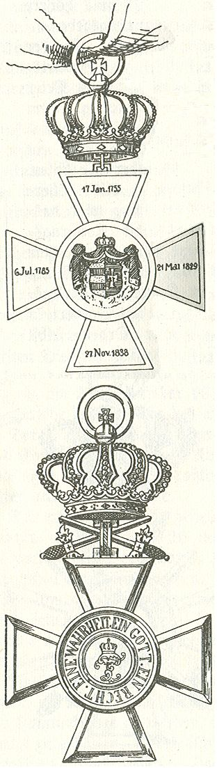 Haus- und Verdienstorden des Herzogs Peter Friedrich Ludwig